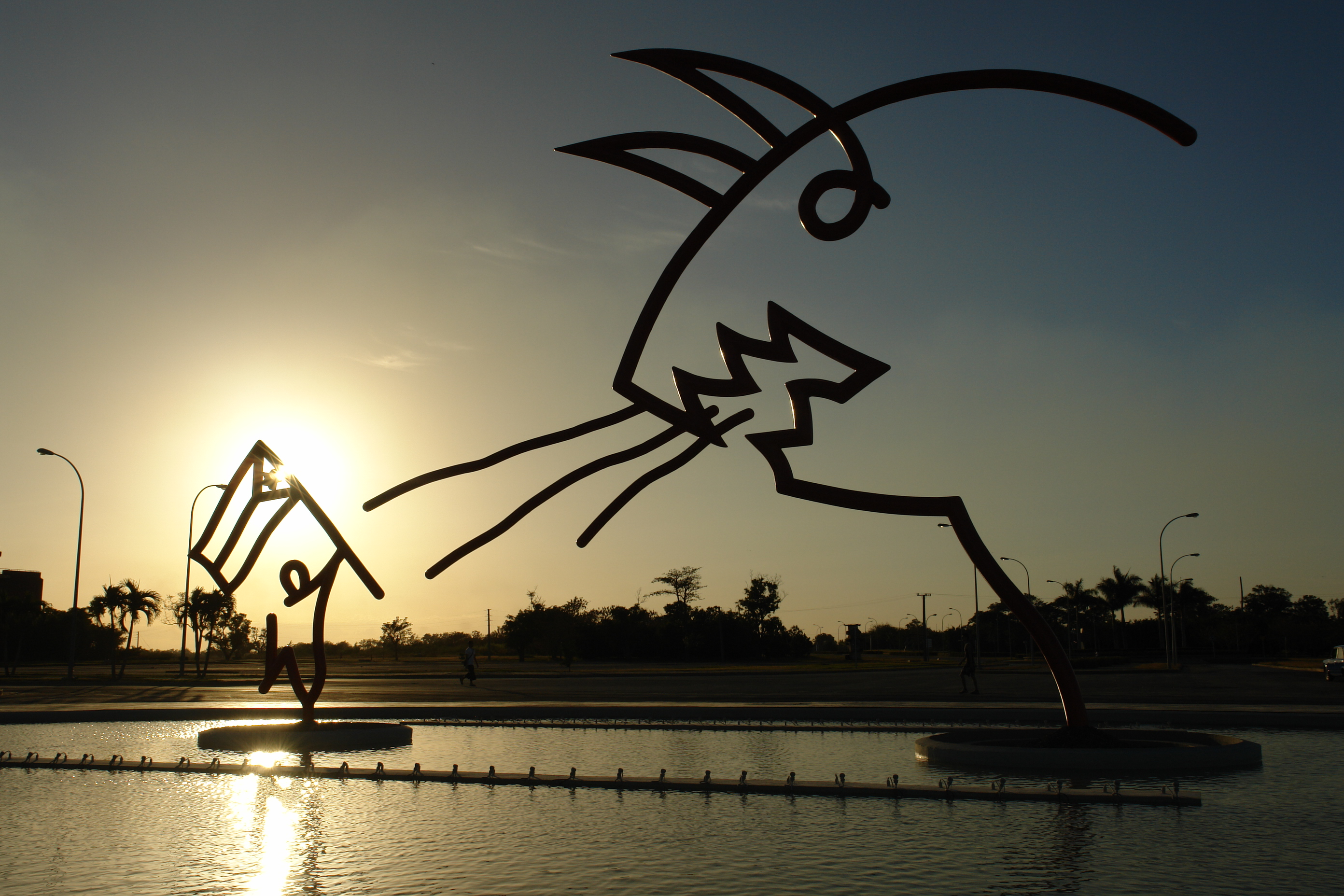 Plaza Niemeyer, amanecer